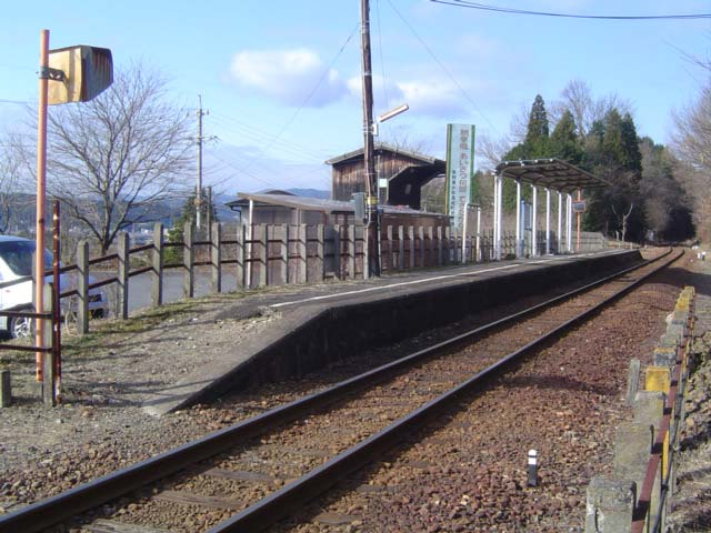 明知鉄道東野駅 投稿者が撮影（2004年12月22日）